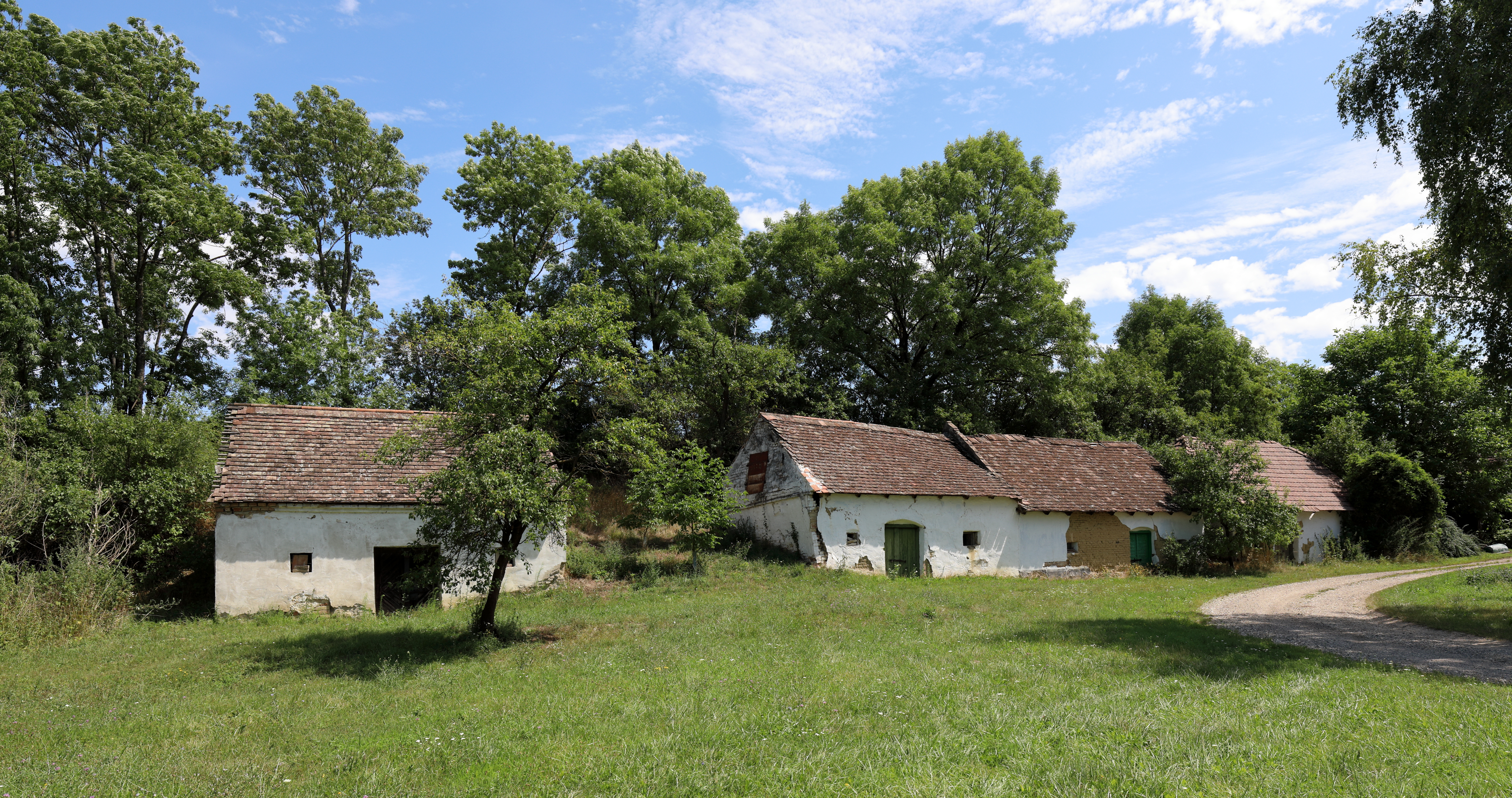 Die dem Verfall preisgegebene Kellergasse nächst Grafensulz 70 im Osten des Dorfes Grafensulz, ein Ortsteil der niederösterreichischen Marktgemeinde Ladendorf.